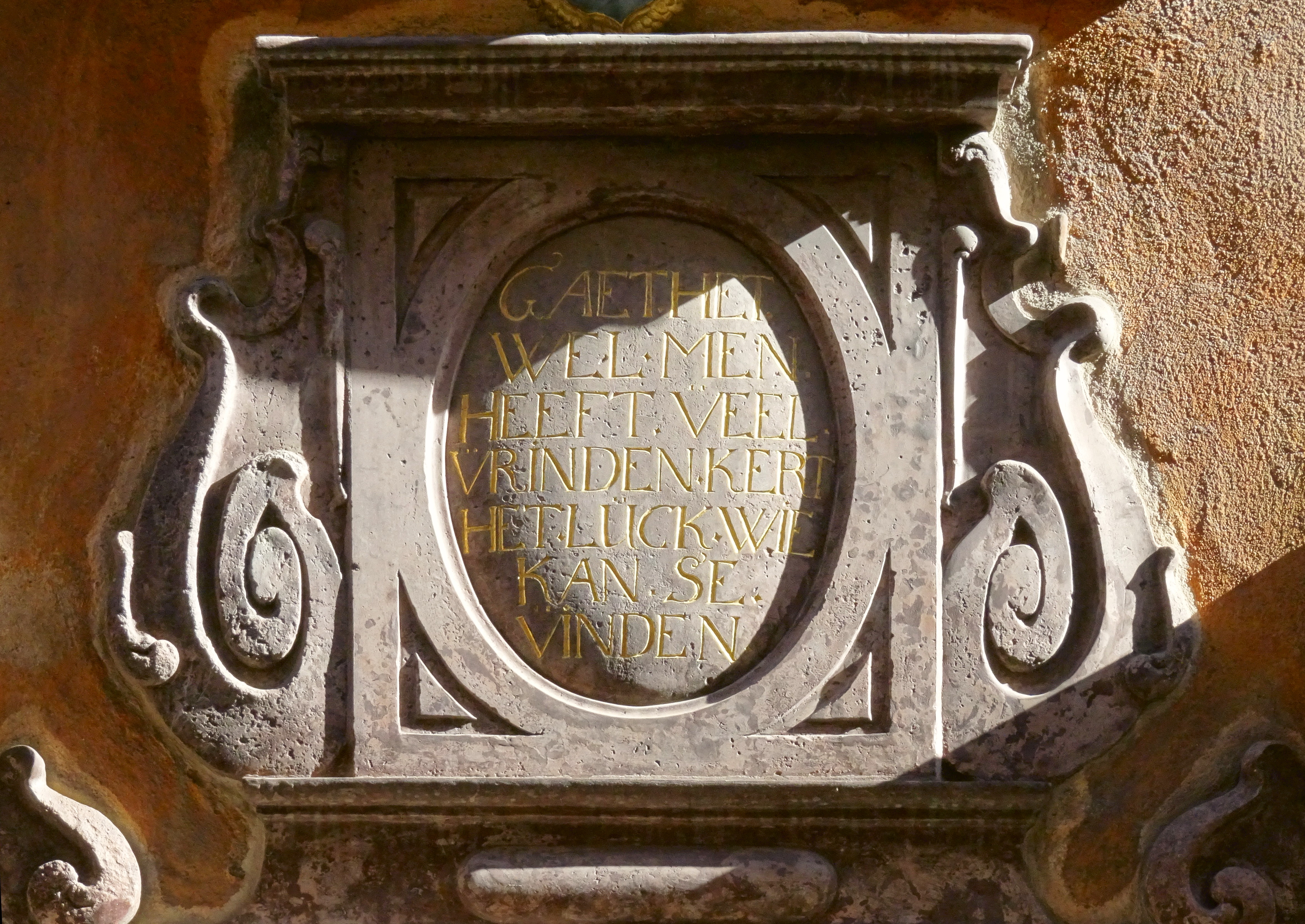 Portalsten på Österlånggatan 37. GAET. HET. WEL. MEN. HEEFT. VEEL. VRINDEN. KERT. HET. LÜCK. WIE. KAN. SE. VINDEN (ungefär: Går det väl, har man många vänner. Vänder lyckan - var då finna dem?).